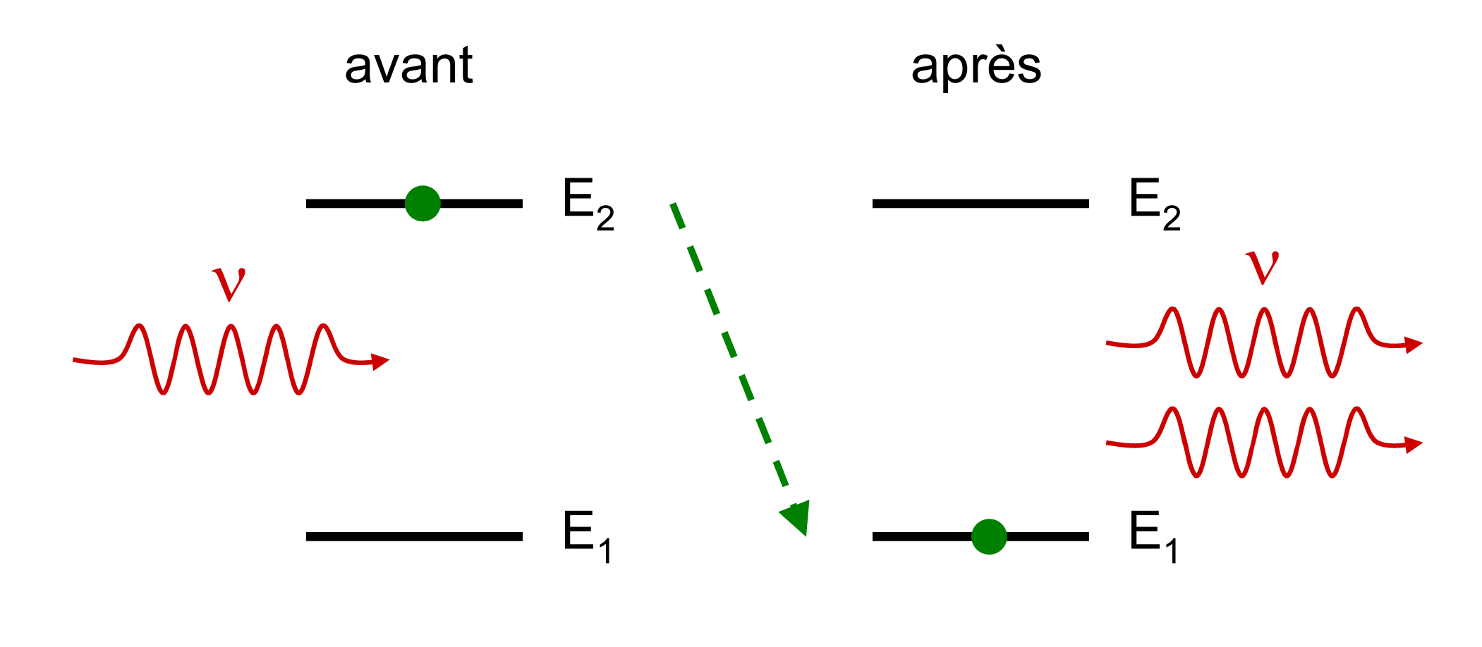 Illustration du phénomène d'émission stimulée